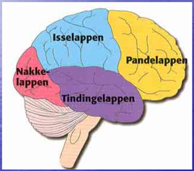 hjernens forskellige områder pandelap, tindinge lap osv